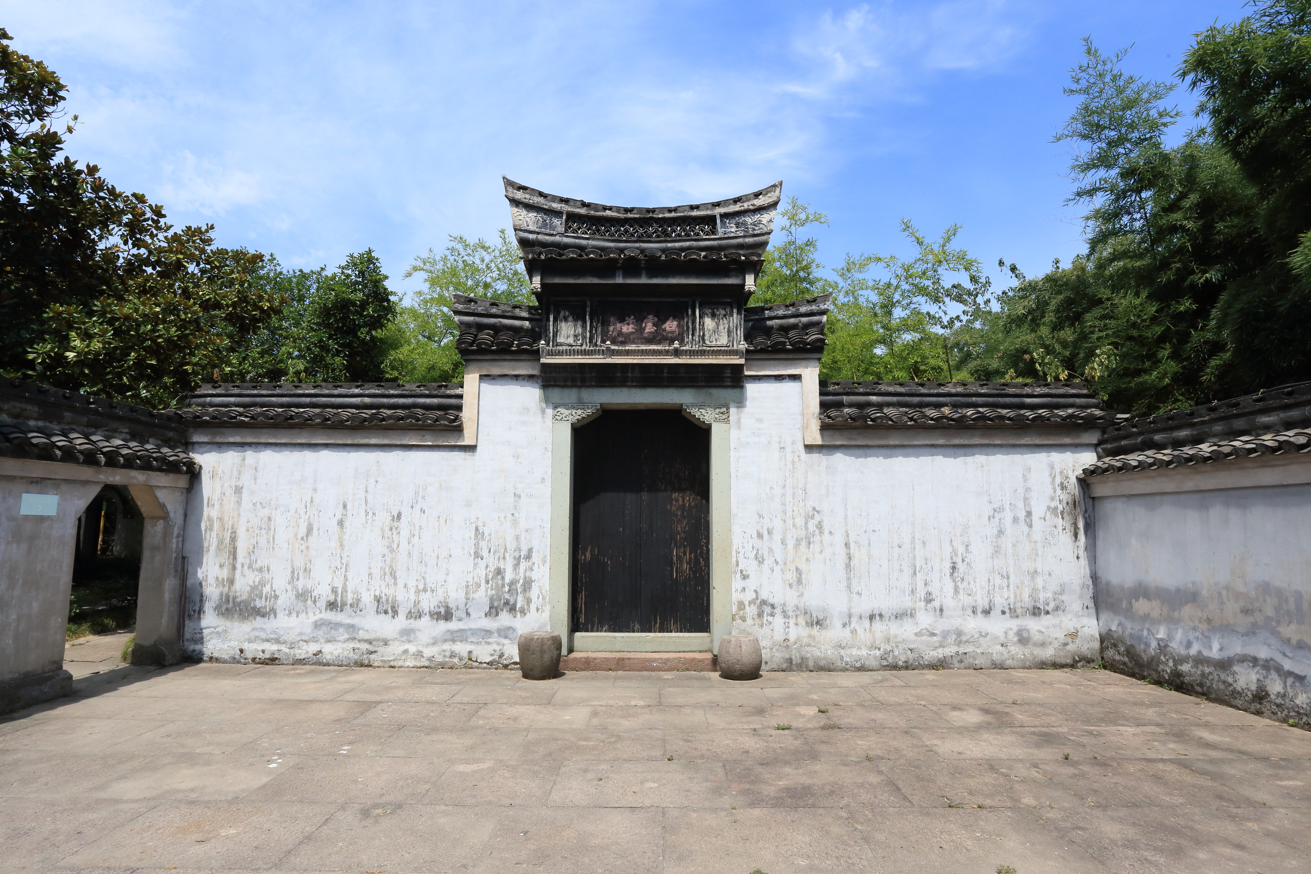 宁波白云庄 —— 原东门，在东北角小门内